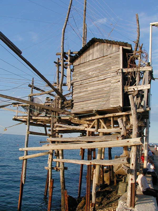 Ein Trabocci bei Ortona (San Vito)